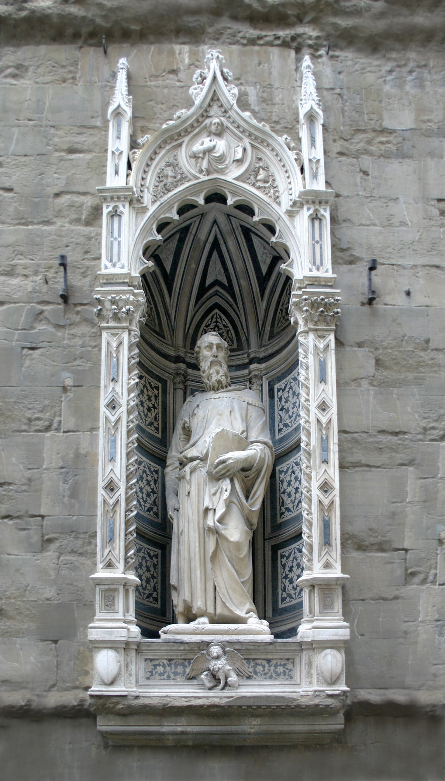 "Hl. Markus", Skulptur Donatellos an der Fassade Orsanmicheles, Florenz